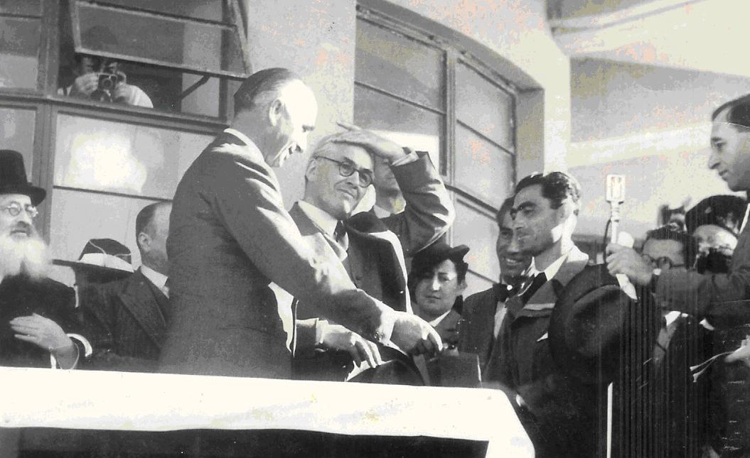 בנימין כהנא מקבל את רשיון הטיסה מס' 6 בארץ ישראל מידי הנציב העליון הרולד מקמייקל, בטקס סיום קורס הטייס של אצ"ל